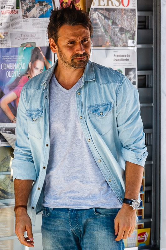 Murilo Rosa no filme "Menina Índigo"